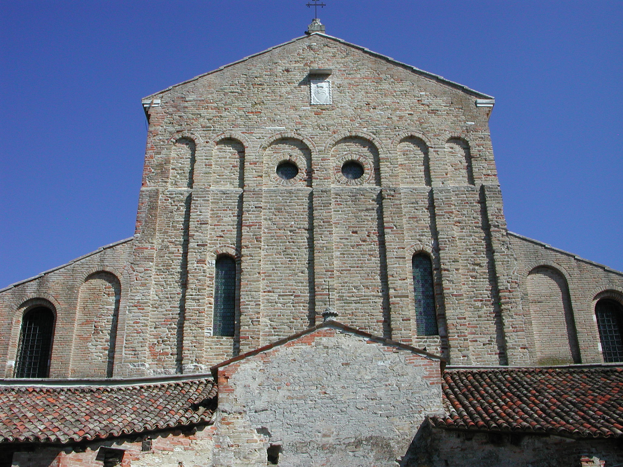 Basilica di Santa Maria Assunta a Torcello. Source: photo uploaded by User:RicciSpeziari. Photographer: Riccardo Speziari